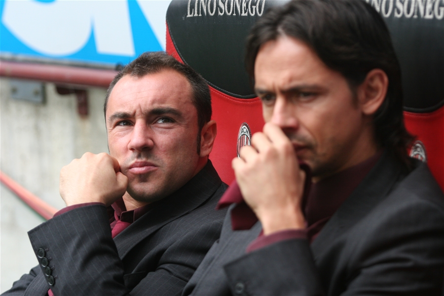 Cristian Brocchi and Filippo Inzaghi